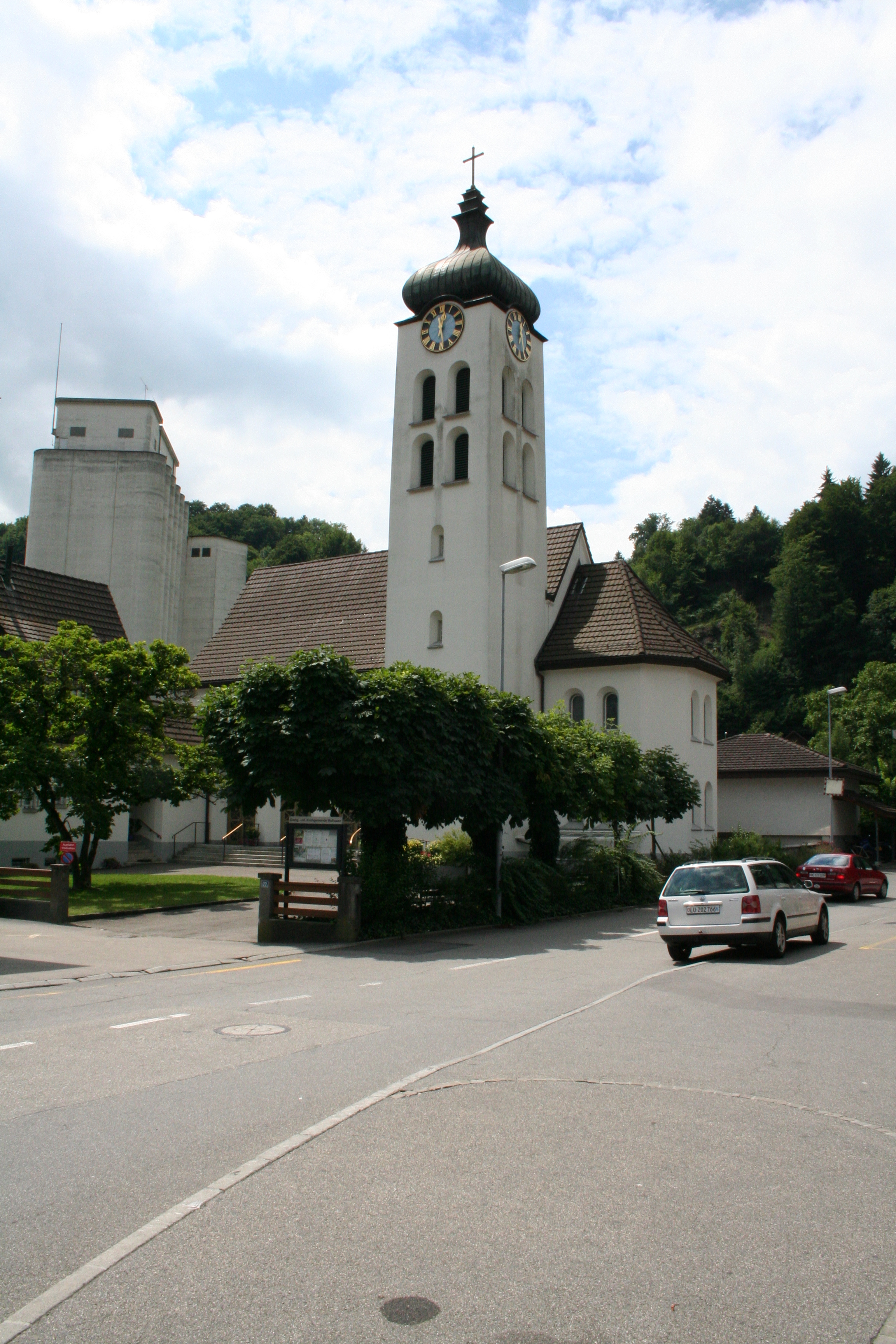 Reformierte Kirche von Wolhusen. Architekt: Armin Meili (1892-1981).